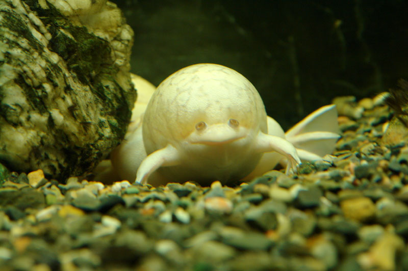 თბილისის ზოოპარკის აკვარიუმი.